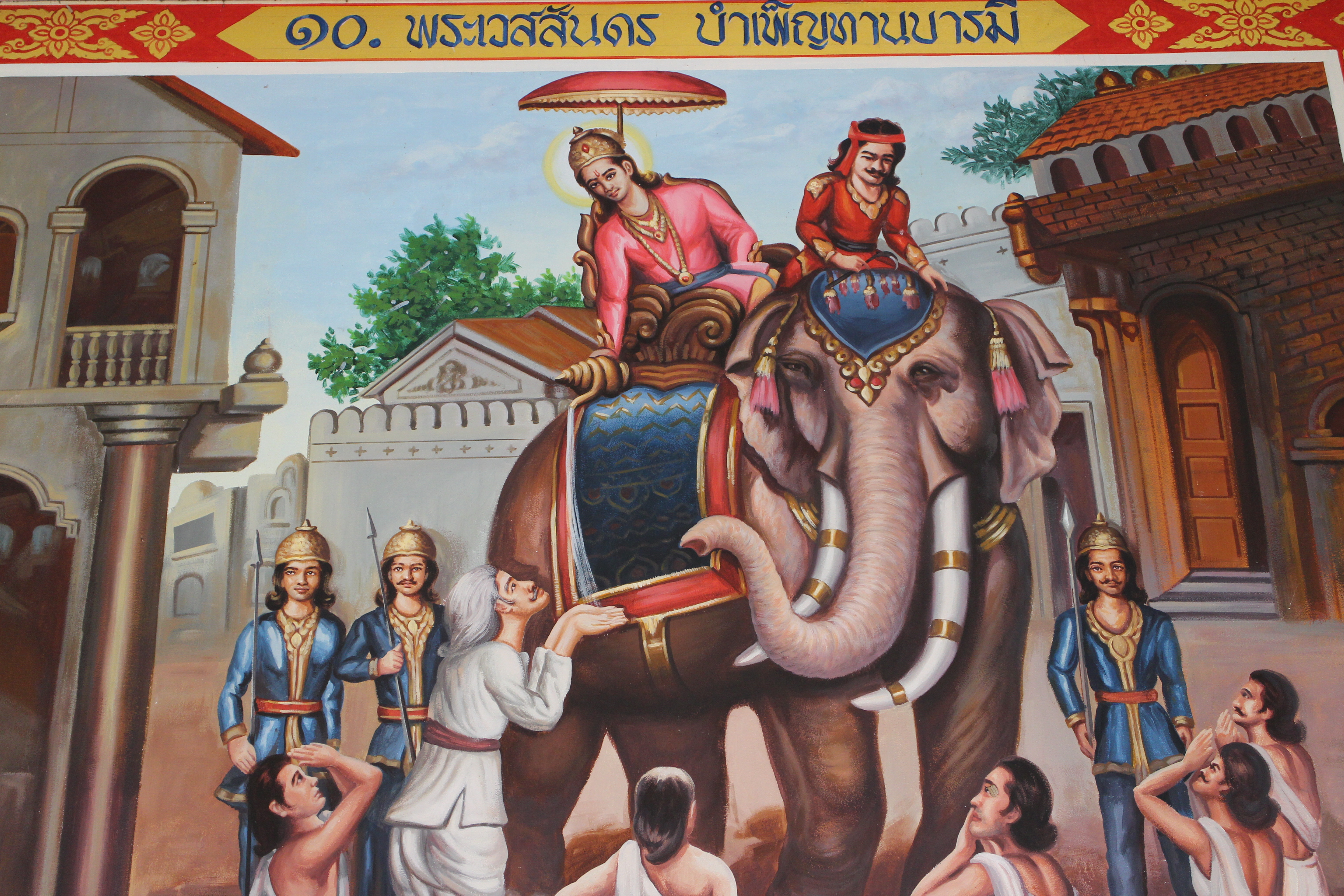 Vessantara deelt aalzoezen uit.